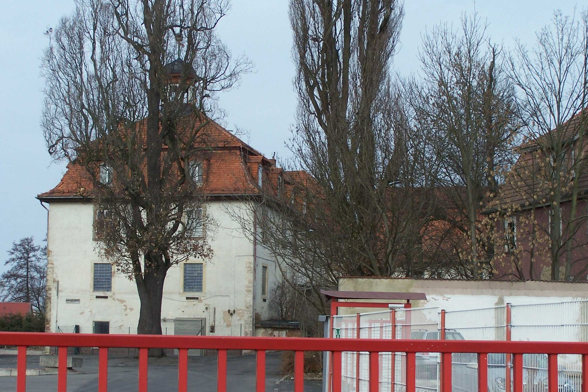 Barchfeld, Blick auf das ehemalige Landgrafenschloss Wilhelmsburg